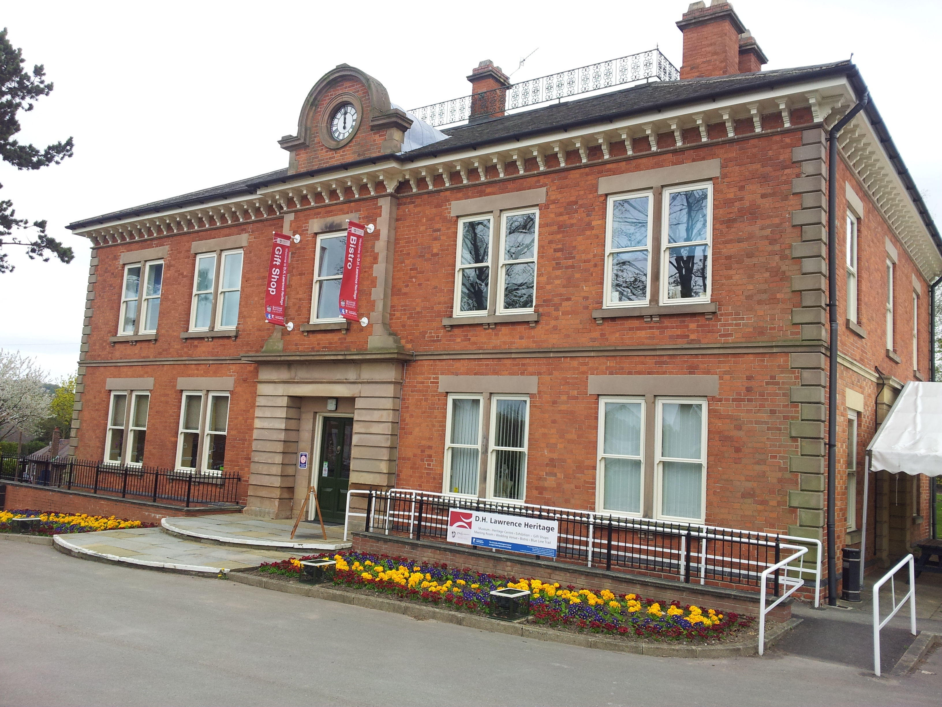 Durban House Heritage Centre